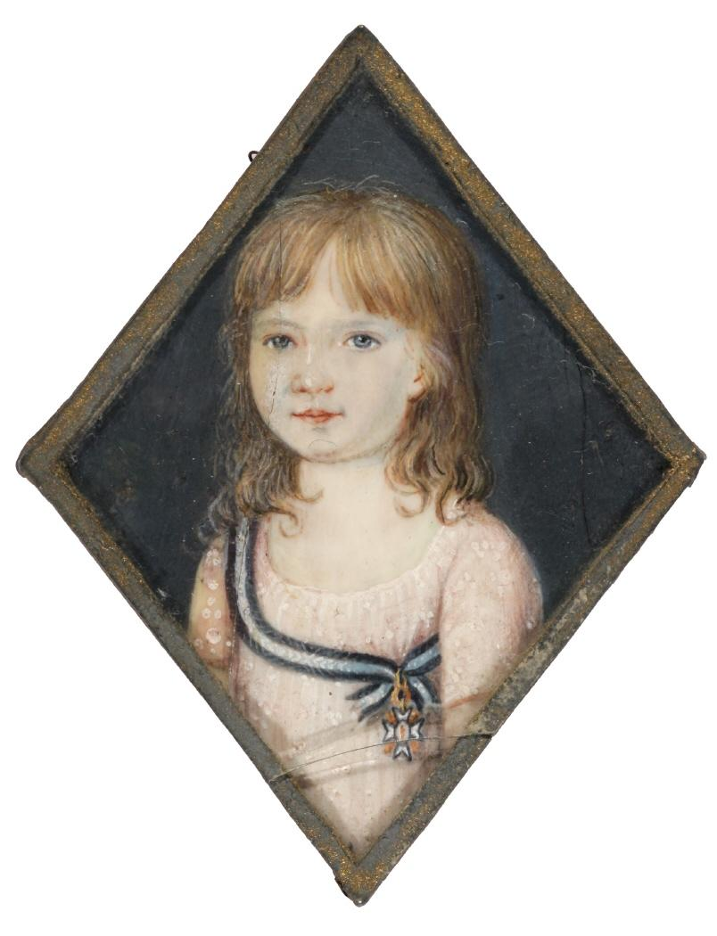 Retrato de medio cuerpo de Carlota Luisa de Godoy y Borbón (1800-1886), prácticamente frontal, recortada sobre fondo neutro. De ojos claros y tenue sonrisa, luce cabello suelto que cae desenfadado sobre sus hombros. Viste con camisa rosa aderezada por la Banda de la Real Orden de Maria Luisa, terciada desde el hombro derecho, y venera de la misma orden.